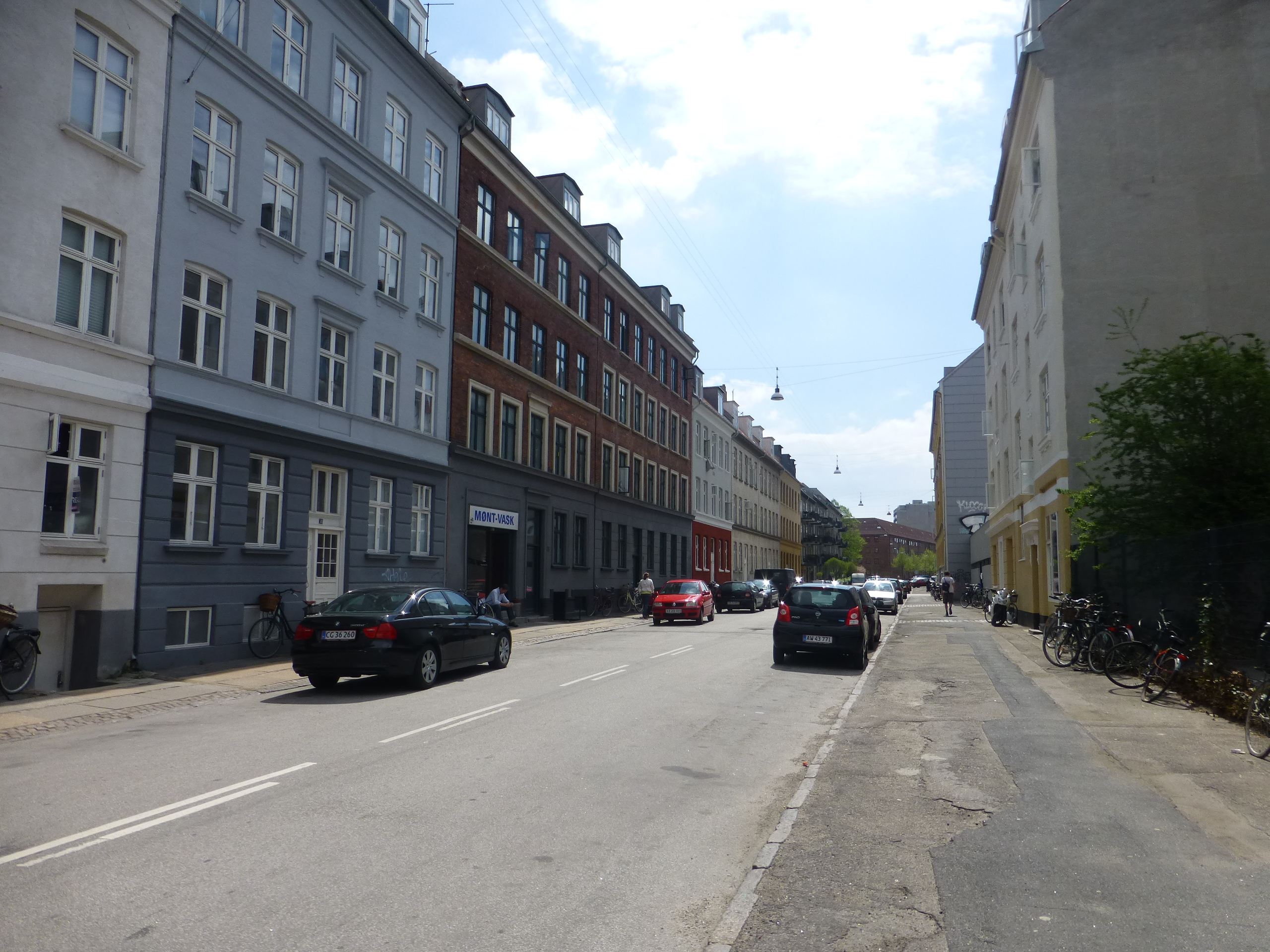 The street Fanøgade in Østerbro in Copenhagen.